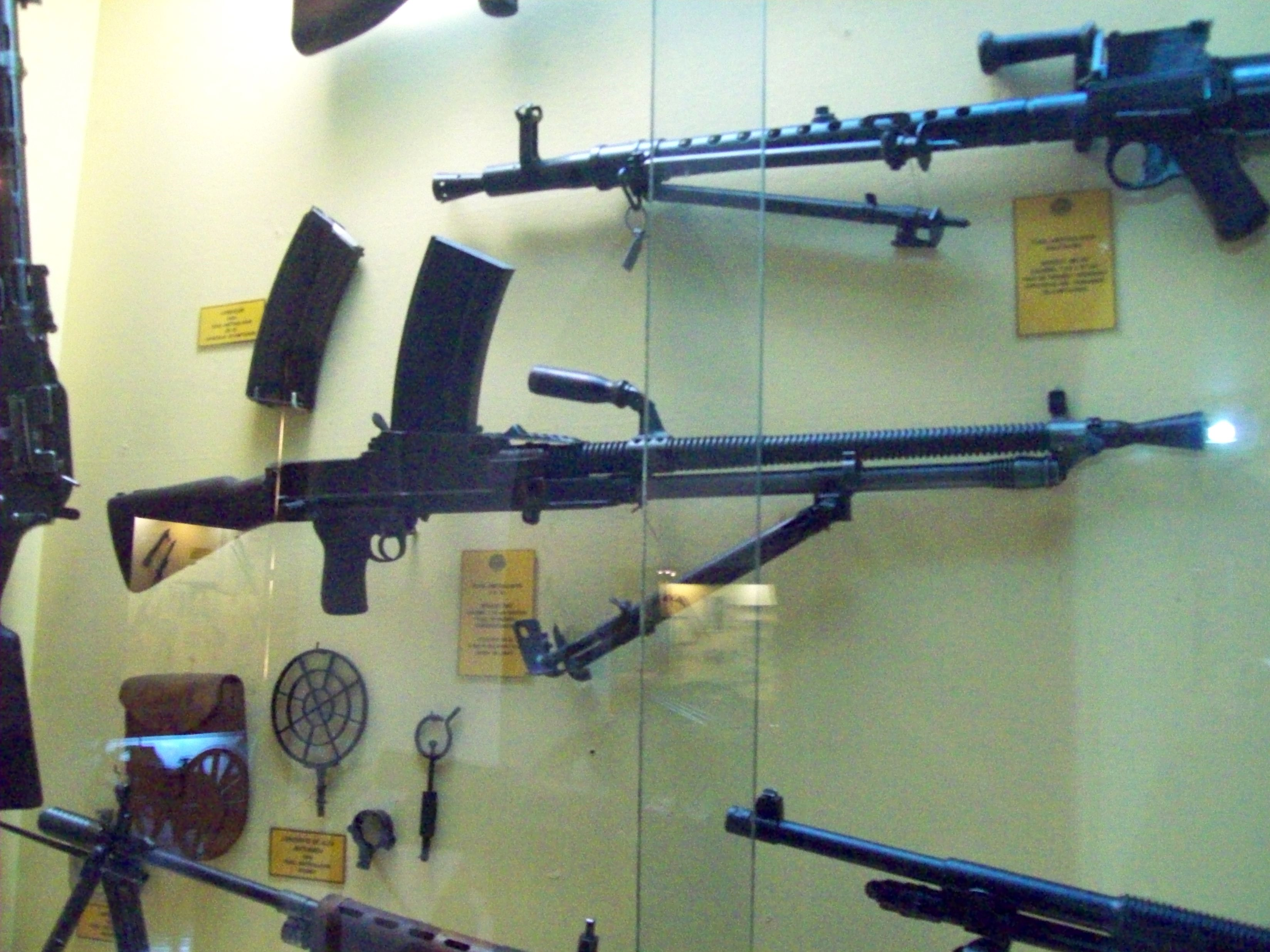 expuesto en el Museo de Armas, ciudad de Buenos Aires, Argentina 2014.